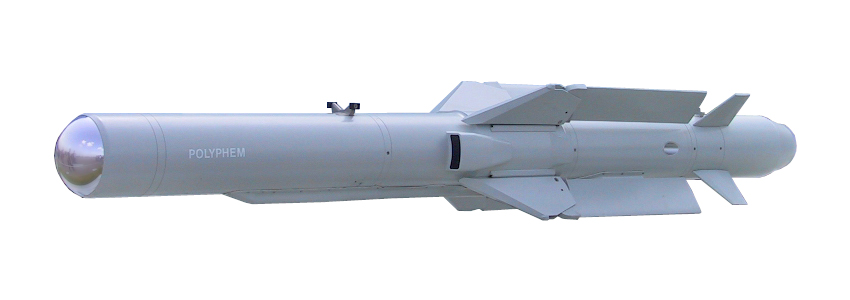 Seezielflugkörper Polyphem auf der ILA 2002.